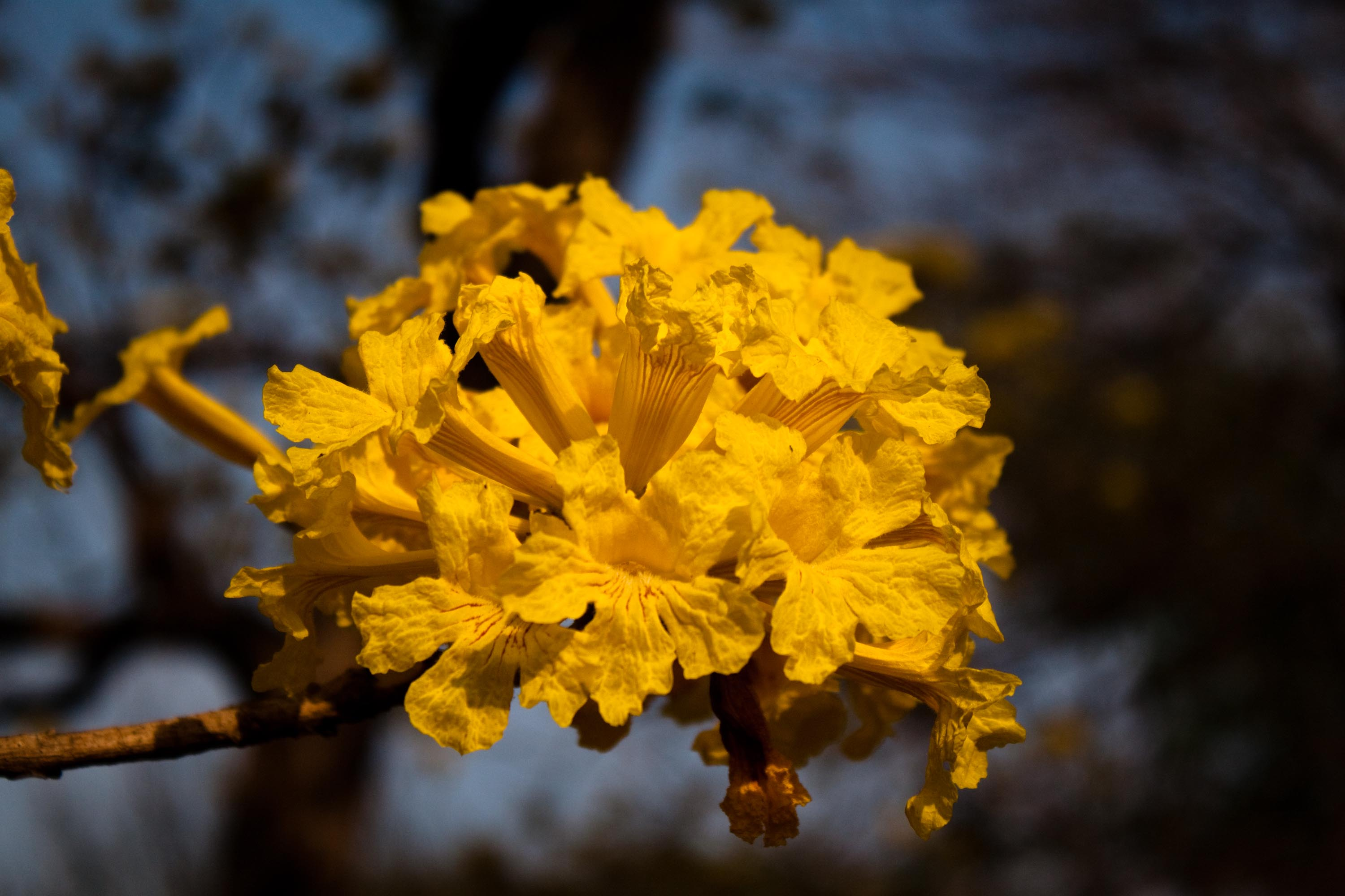 Detalle de la flor de Araguaney